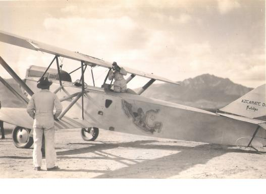 SESQUIPLANO AZCARATE